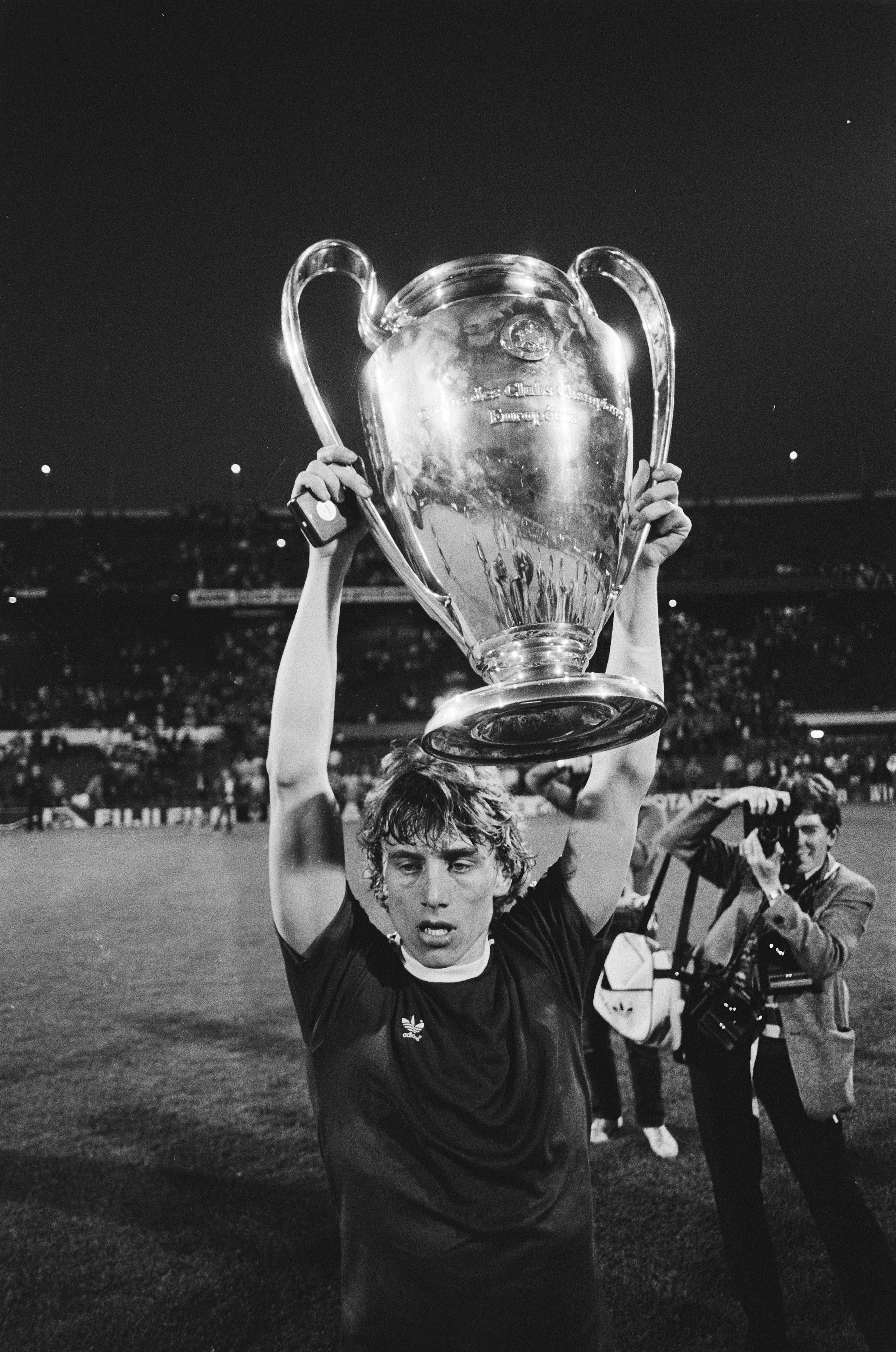 Collectie / Archief : Fotocollectie Anefo Reportage / Serie : [ onbekend ] Beschrijving : FC Bayern Munchen tegen Aston Villa 0-1 Europa Cup I blijde Aston Villa spelers met de Cup Datum : 26 mei 1982 Trefwoorden : sport, voetbal Persoonsnaam : Aston Villa, CUP, FC Bayern Munchen Fotograaf : Antonisse, Marcel / Anefo Auteursrechthebbende : Nationaal Archief Materiaalsoort : Negatief (zwart/wit) Nummer archiefinventaris : bekijk toegang 2.24.01.05 Bestanddeelnummer : 932-1809